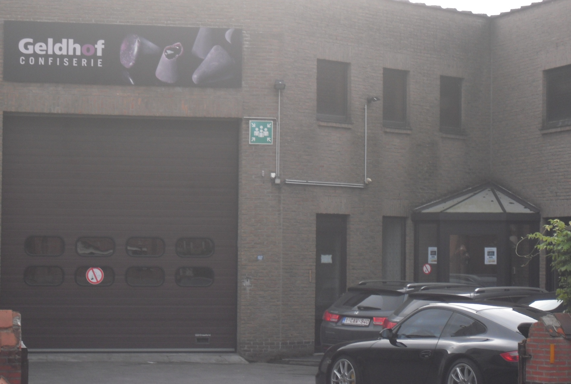 Confiserie Geldhof - Tieltsesteenweg - Eeklo - Oost-Vlaanderen - België